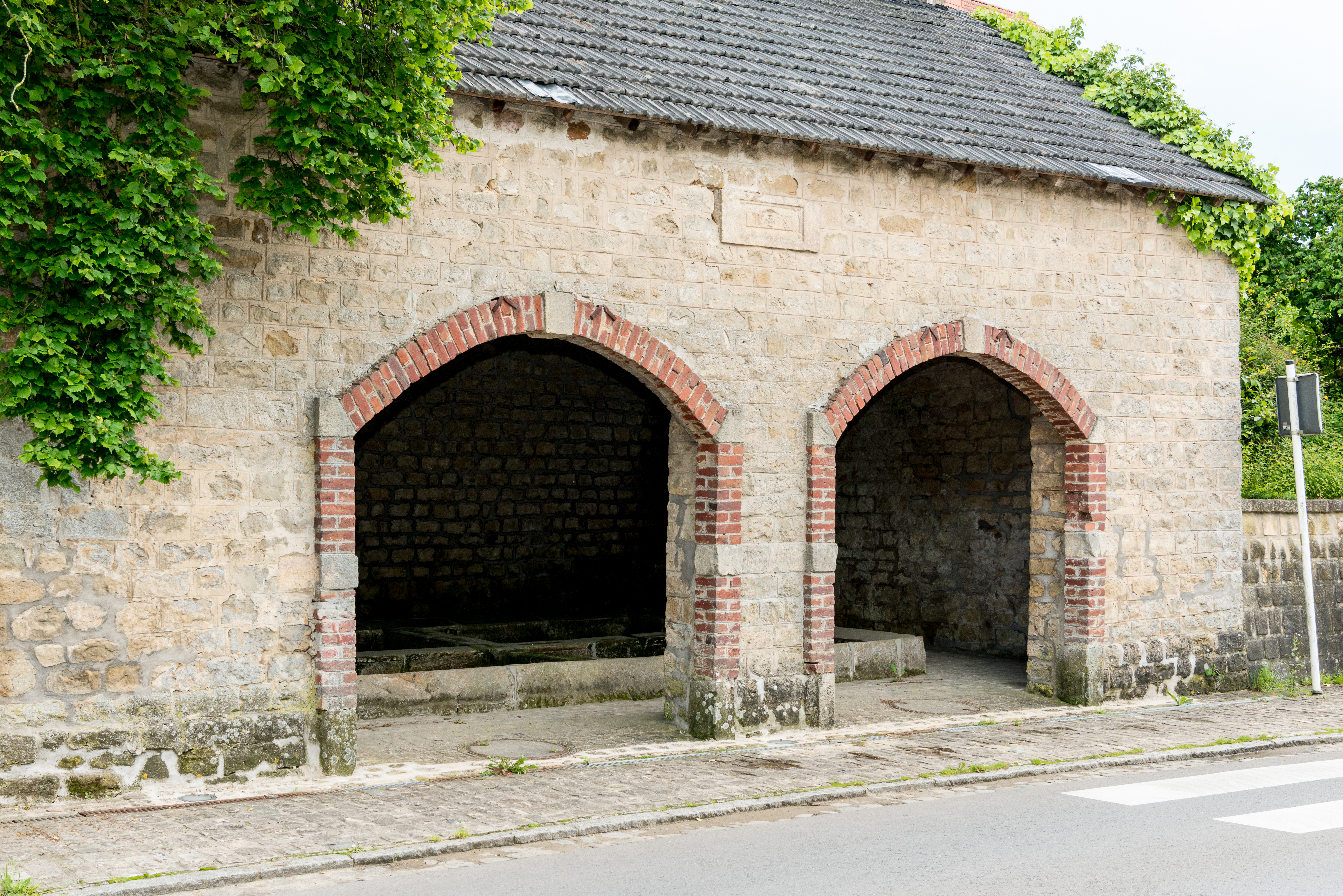 De Lavoir vun 1898 an der Rue de Buschdorf zu Bruch bei Miersch.